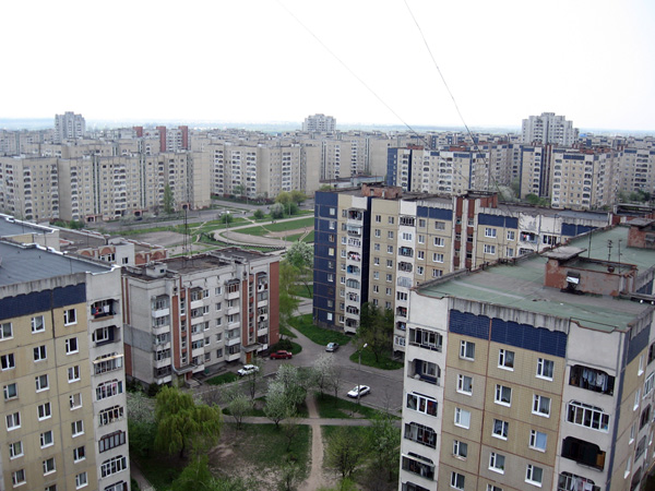 Soviet era buildings in Lviv